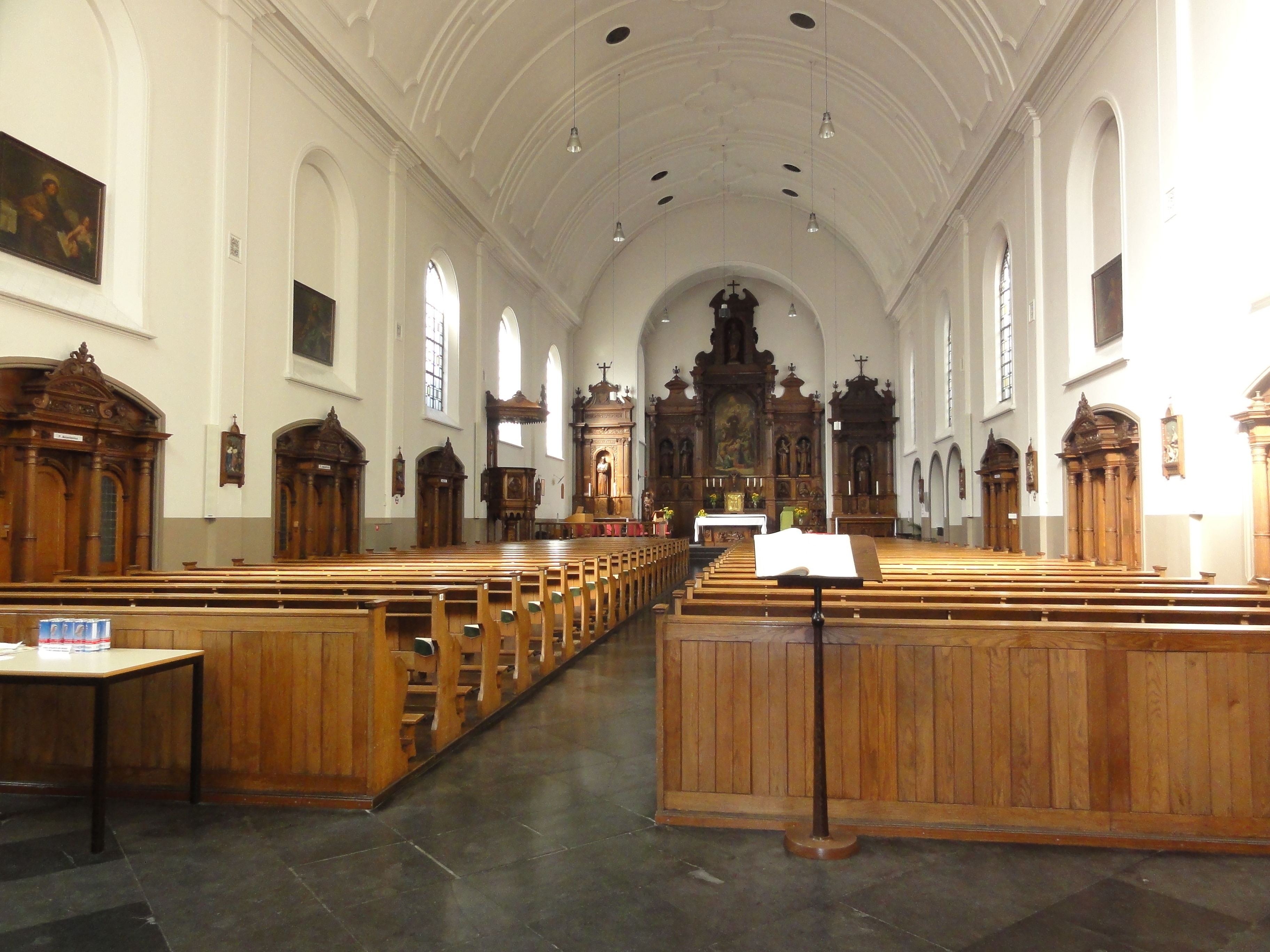 's-Hertogenbosch Rijksmonument 21597 van der Does de Willeboissingel 12 kerk interieur. 58″ N, 5° 17′ 49.02″ E Object location51° 41′ 21.11″ N, 5° 17′ 50.2″ E